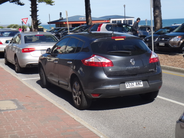 2012 Renault Megane Privilege